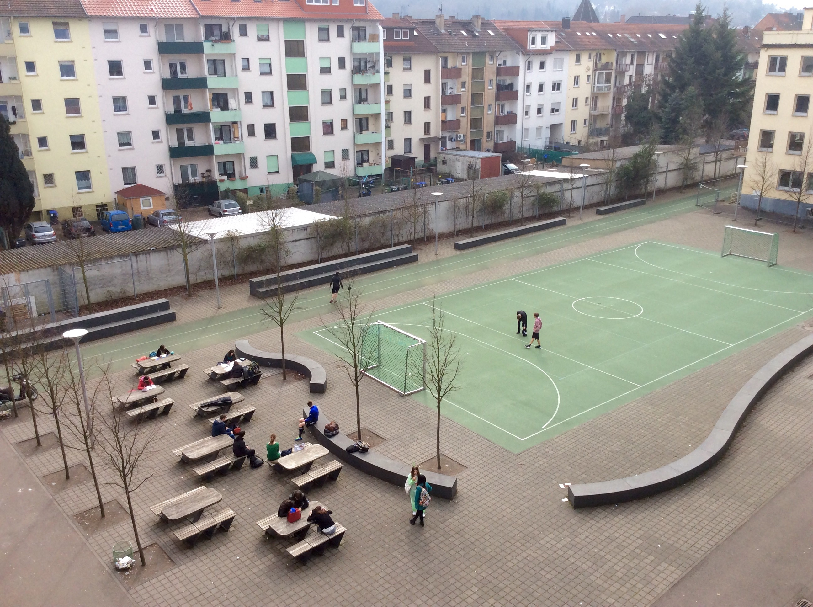 Der Schulhof wurde 2009 neu gestaltet